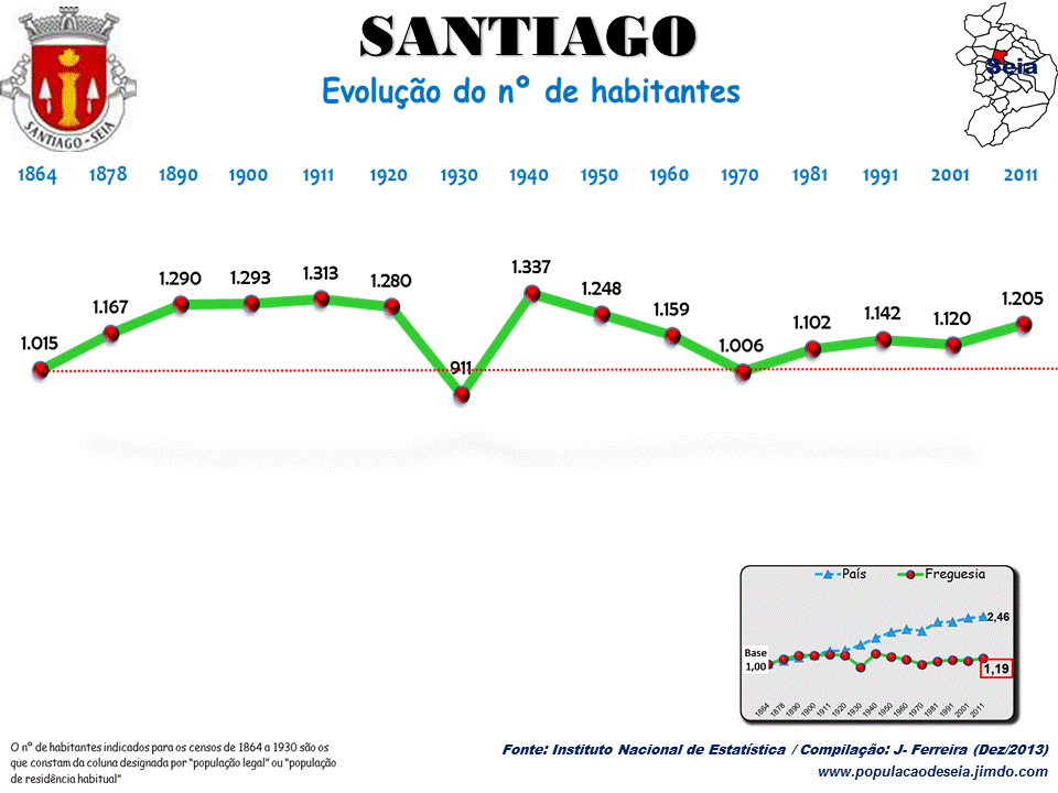 Evolução da População 1864 / 2011